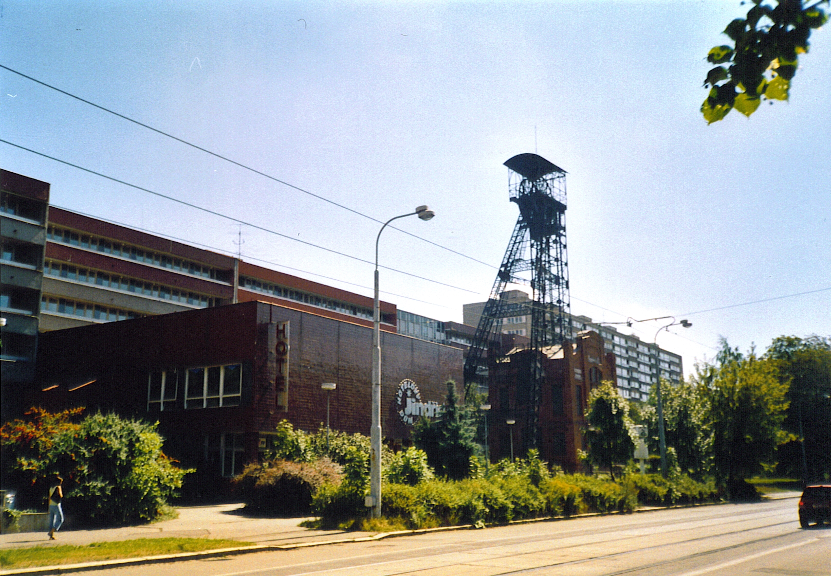 Hotelový dům Jindřich, v pozadí těžební věž bývalého dolu Jindřich